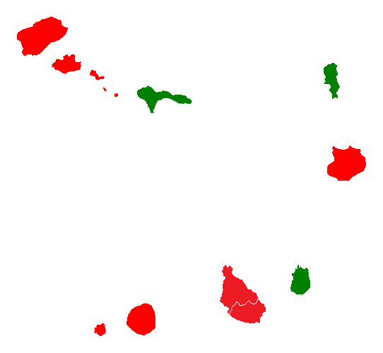 Resultados de la elección parlamentaria de Cabo Verde de 2011, por municipio. En rojo el PAICV, y en verde el MpD.